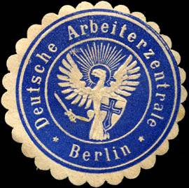 Sealing stamp Title: Deutsche Arbeiterzentrale - Berlin Description: Einwanderer, blau, weiß, geprägt Place: Berlin size: 4 cm